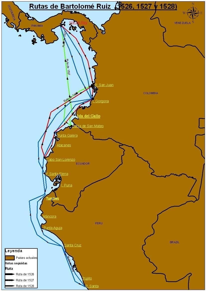 Plano de rutas de exploración de Bartolomé Ruiz.